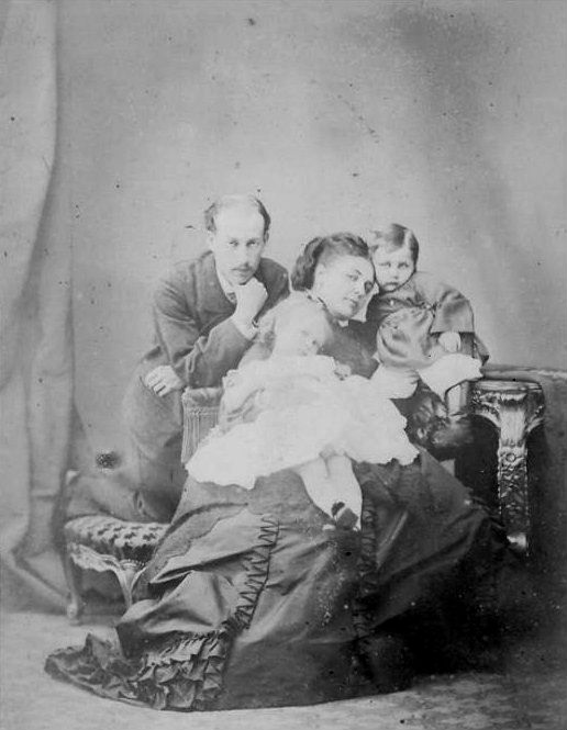 Князя Анатолий Александрович Куракин с женой Елизаветой Михайловной, рожд. Волконской, и детьми.